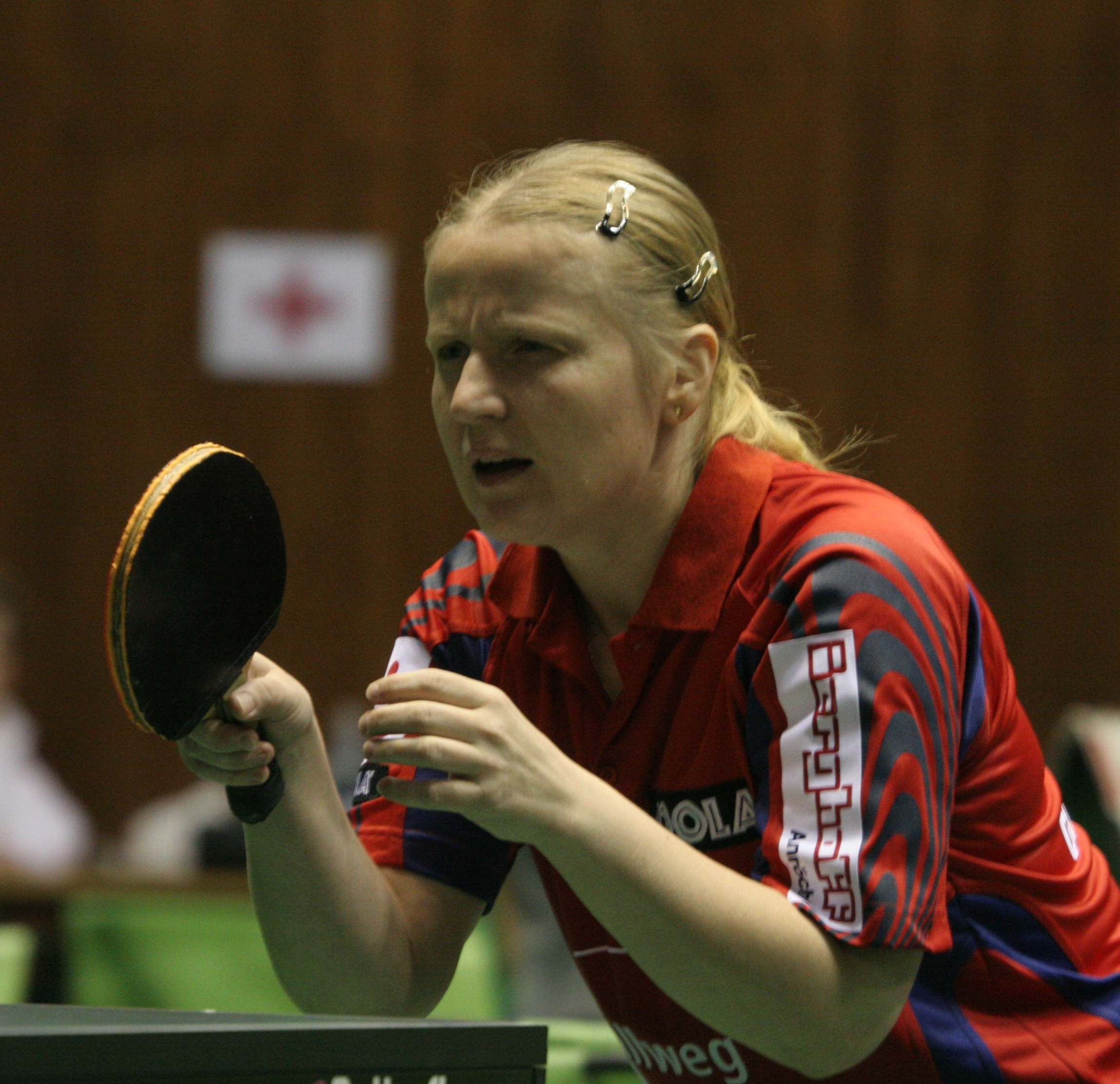 Галина Мельник на чемпионате Москвы, 17 декабря 2006 года.